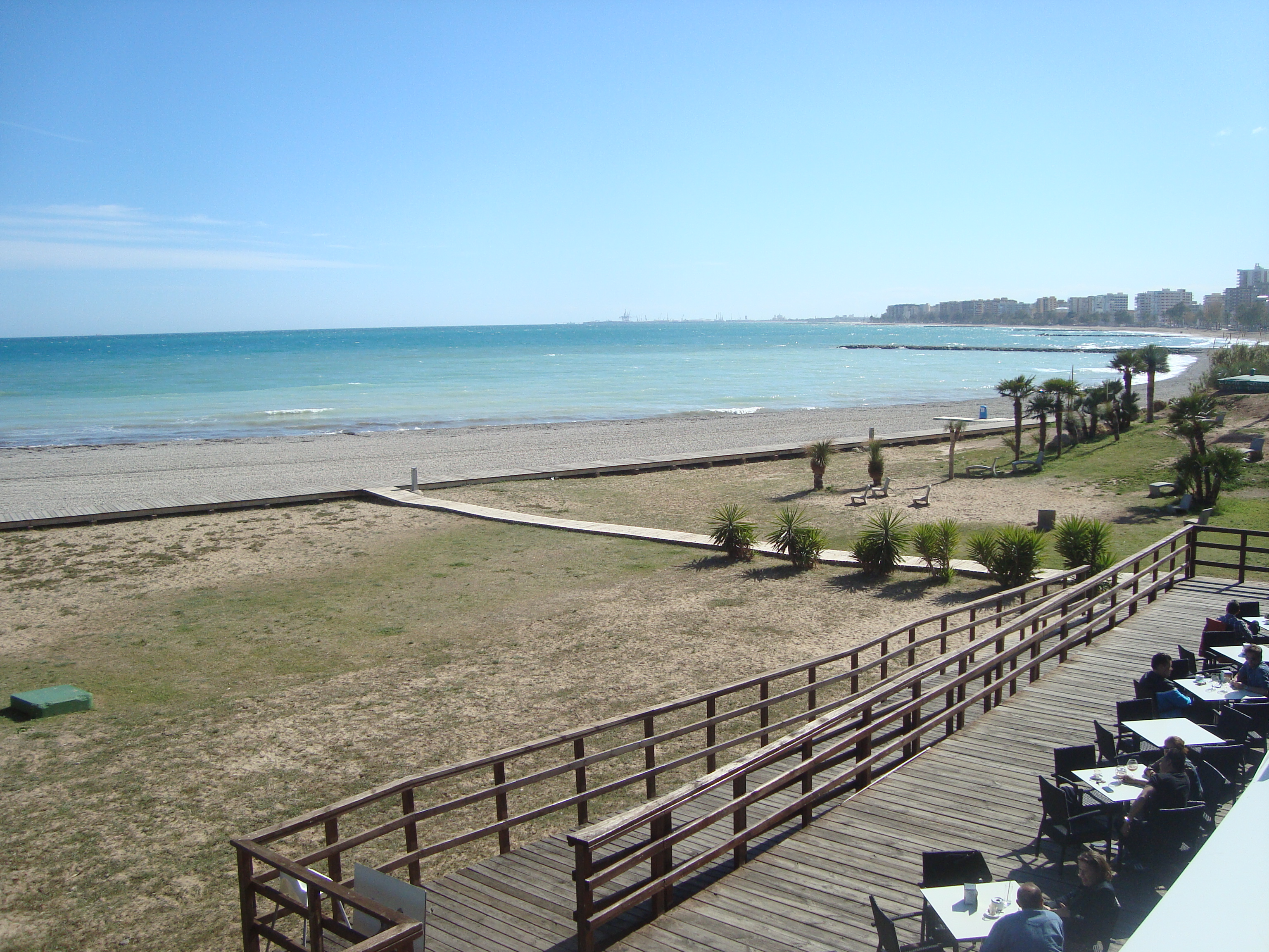 Platja dels Terrers (Benicàssim) This is a a photo of a beach in the Land of Valencia, Spain, with id: PL-1426